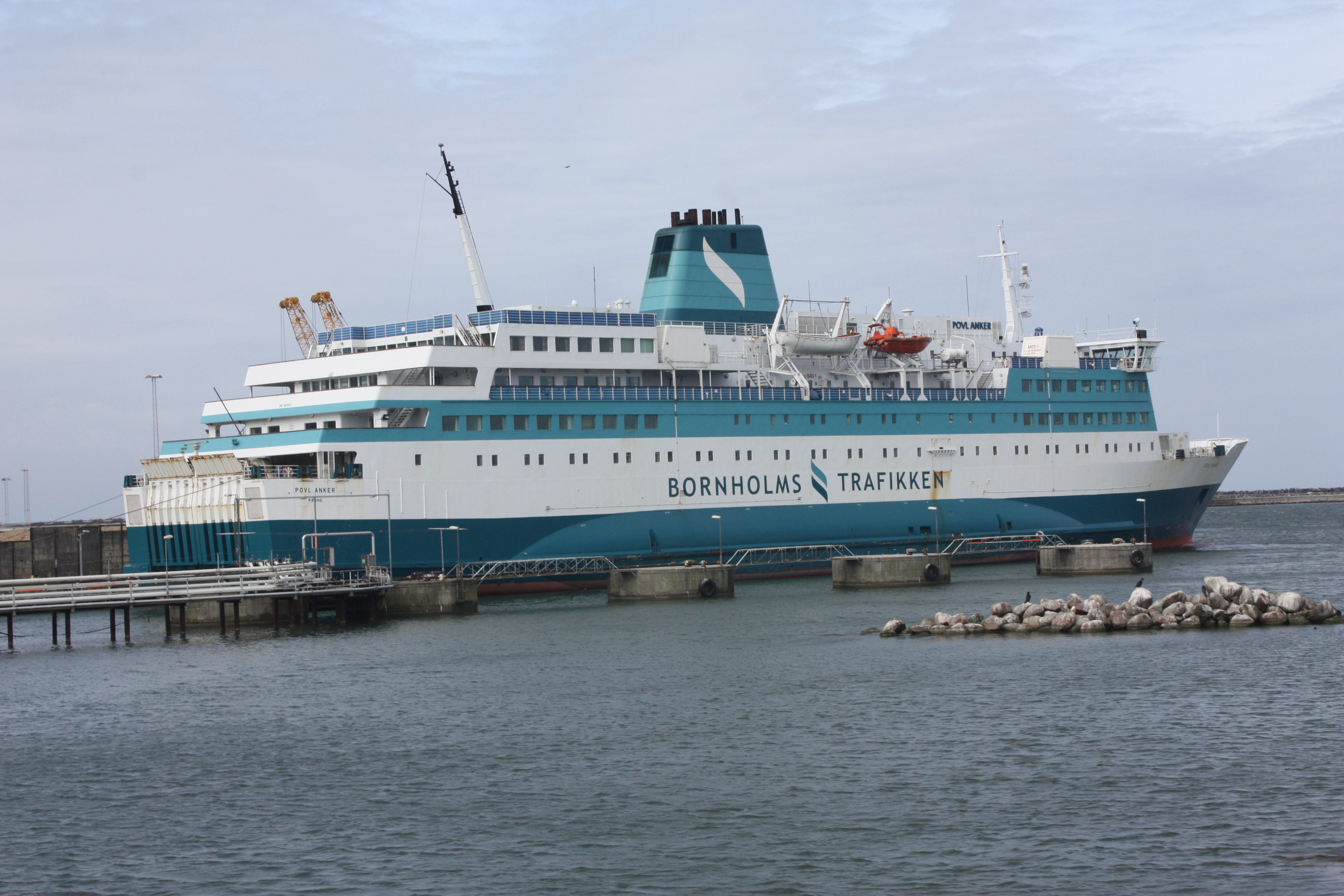 MS Povl Anker, Rønne, Borholm, August, 2009